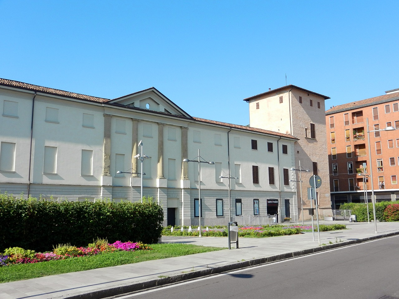 Melzo - Palazzo Trivulzio